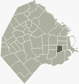 Barrio de Constitución